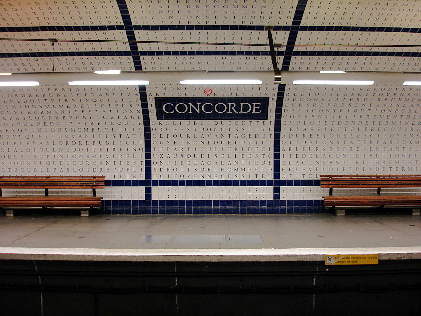 Inscription sur carreaux de céramique, lettres bleues sur fond blanc reconstituant le texte de la Déclaration des droits de l'homme et du citoyen de 1789, 1991, station de métro Concorde de la ligne 12 du métro de Paris, France.